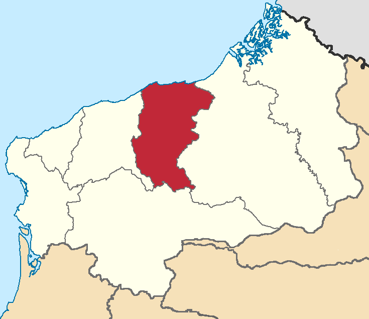 Mapa localizacor del cantón Río Verde, Esmeraldas, Ecuador